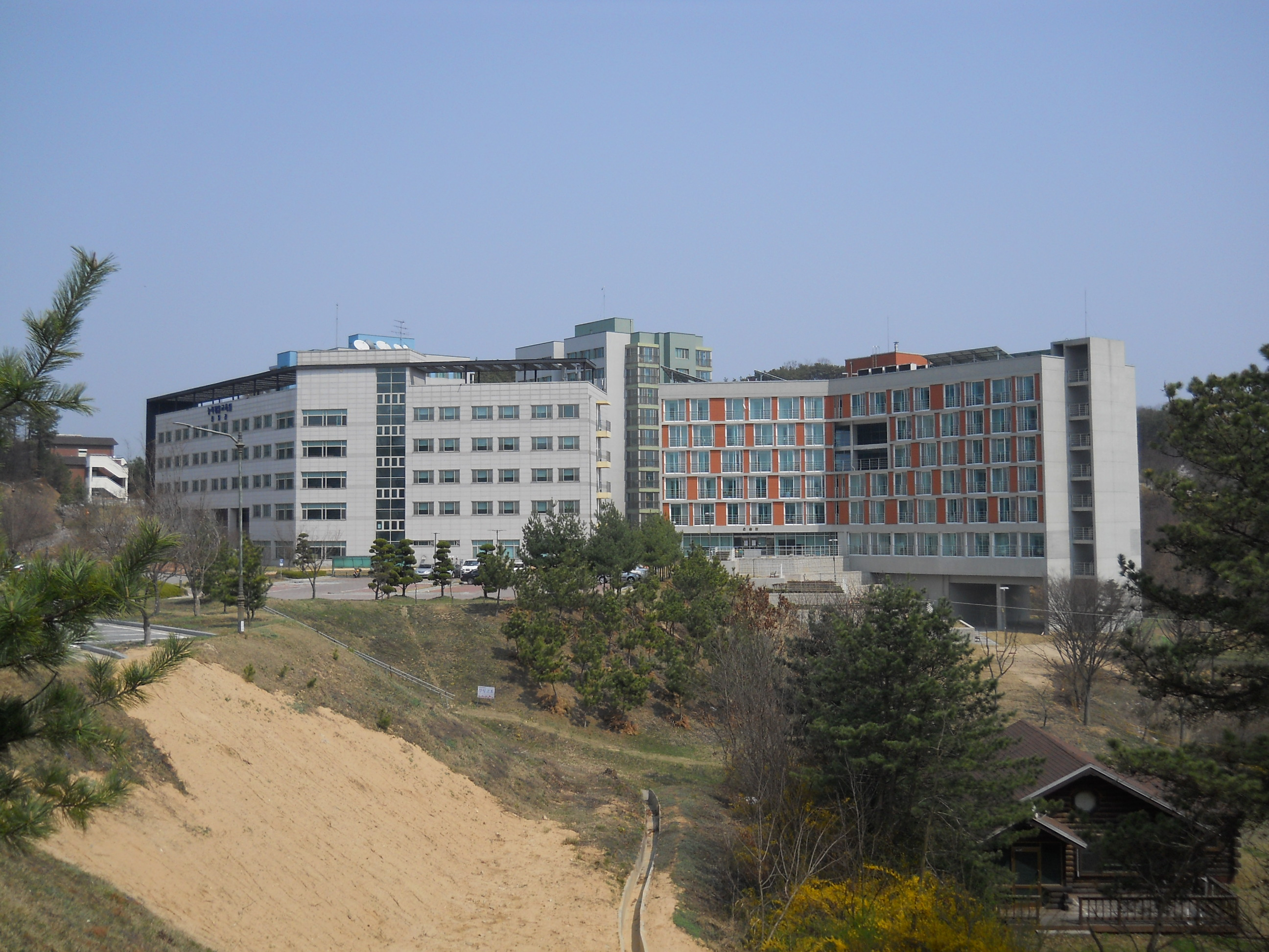 2015년 4월 캠퍼스 컴퍼니에서 바라본 생활관 별관동 전경